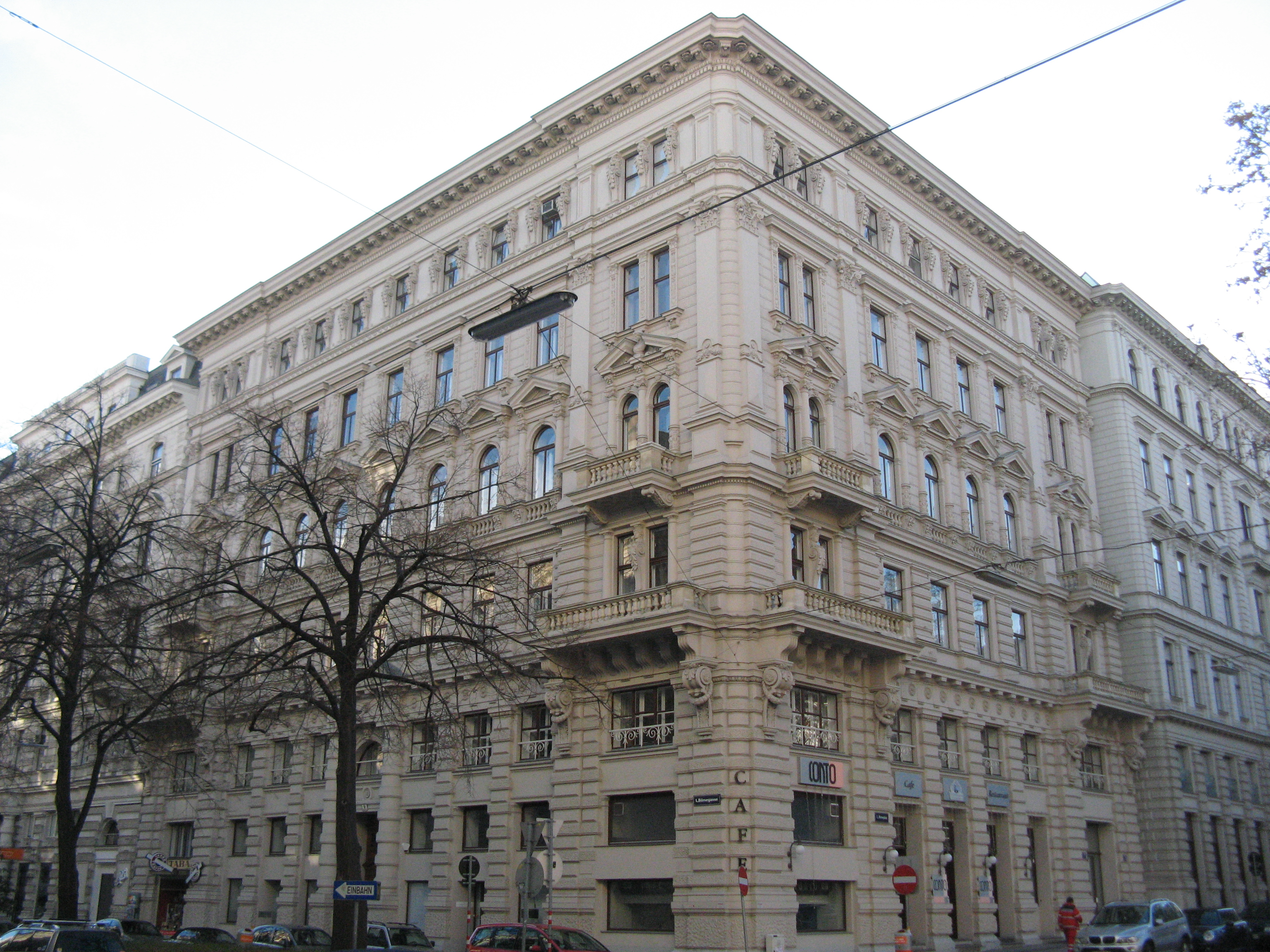 Haus Börsegasse Nr. 9 (1879) von Wilhelm Stiassny, Wien-Innere Stadt